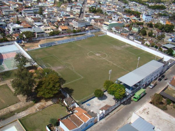 Estádio do Vila Esporte Clube na Rua Leônidas Braga, Formiga - MG.